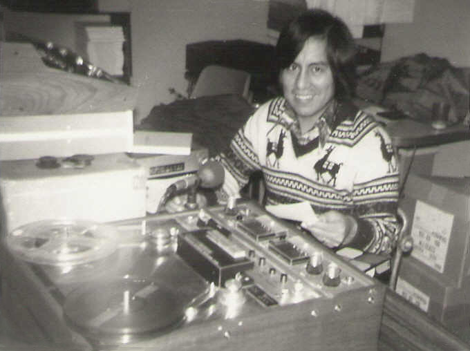 Rómulo Sauñe trabajando en la traducción del Nuevo Testamento